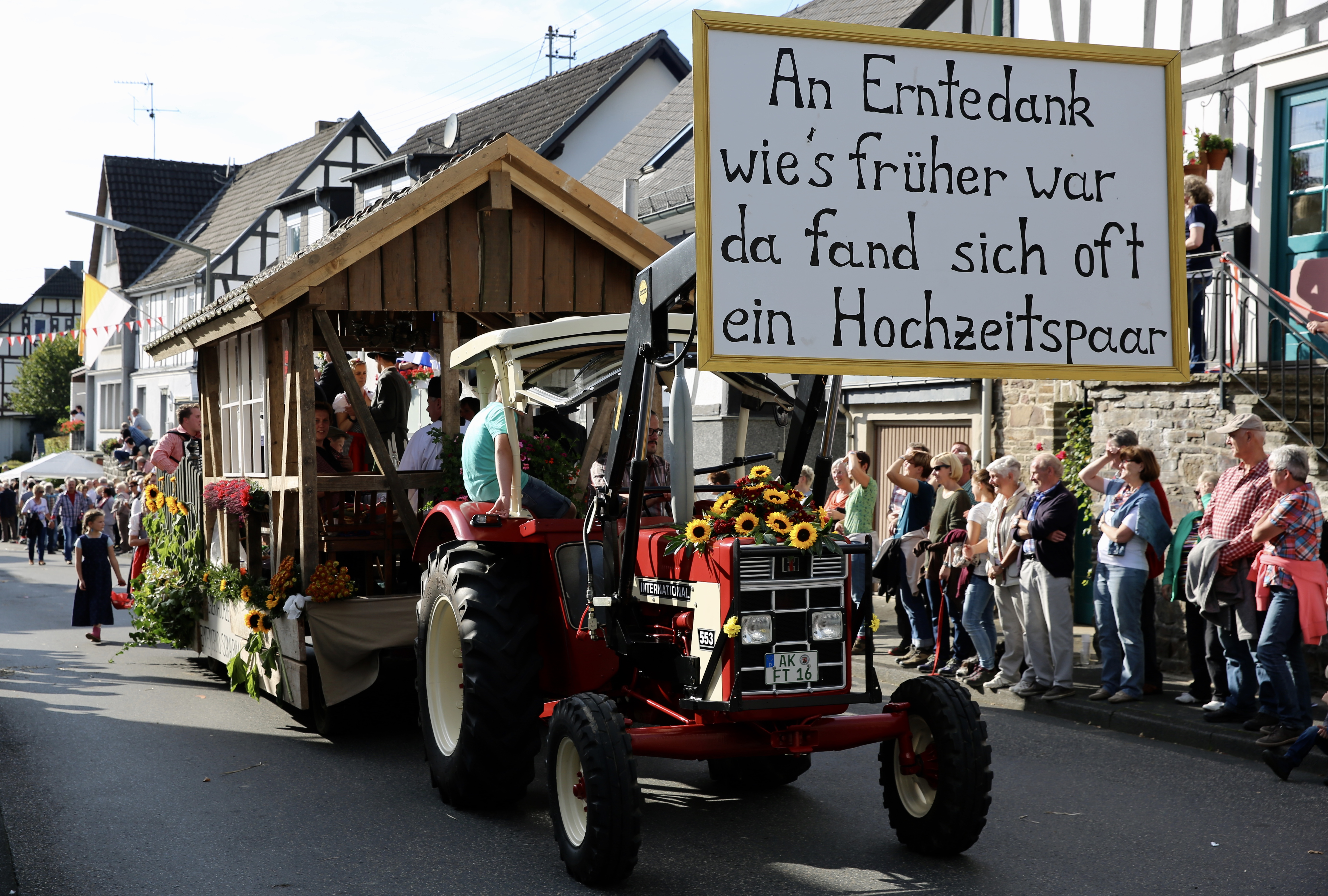 Erntedankfest-Umzug in Friesenhagen. September 2014